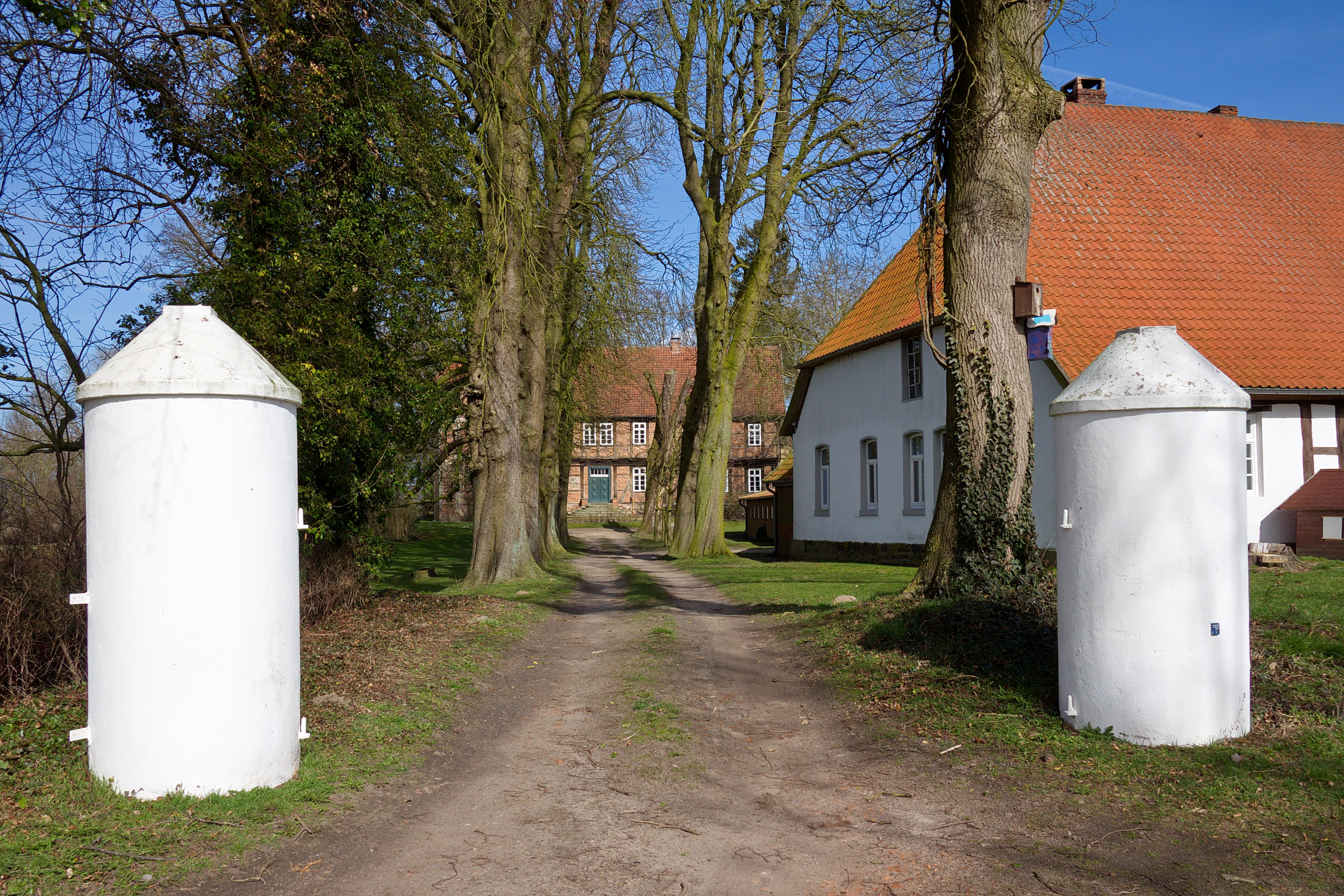 Bothmer (Schwarmstedt), Niedersachsen, Deutschland